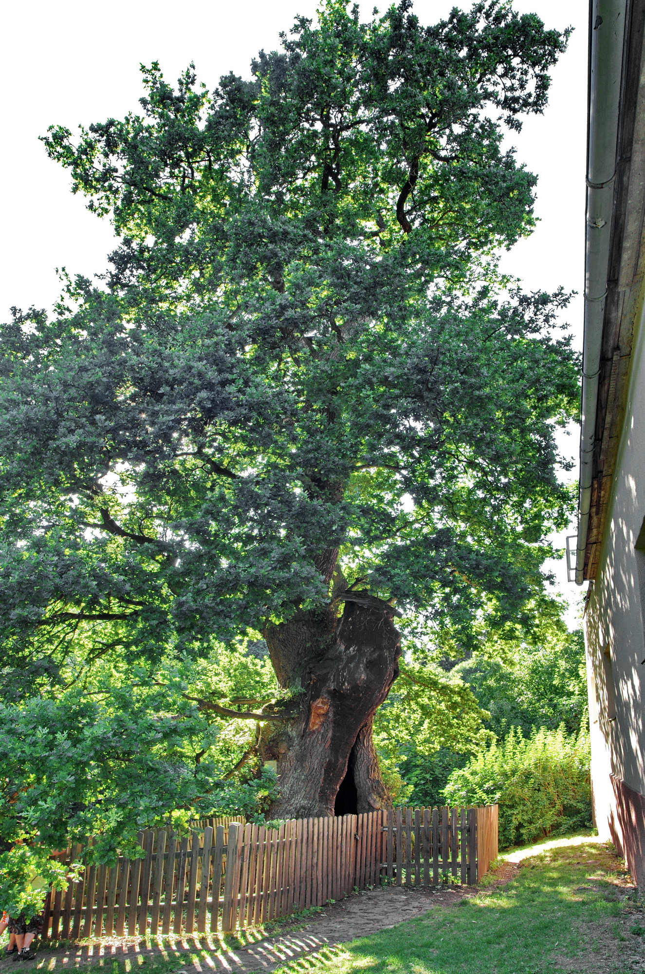 Památný strom Žižkův dub v Podhradí u Třemošnice, okres Chrudim